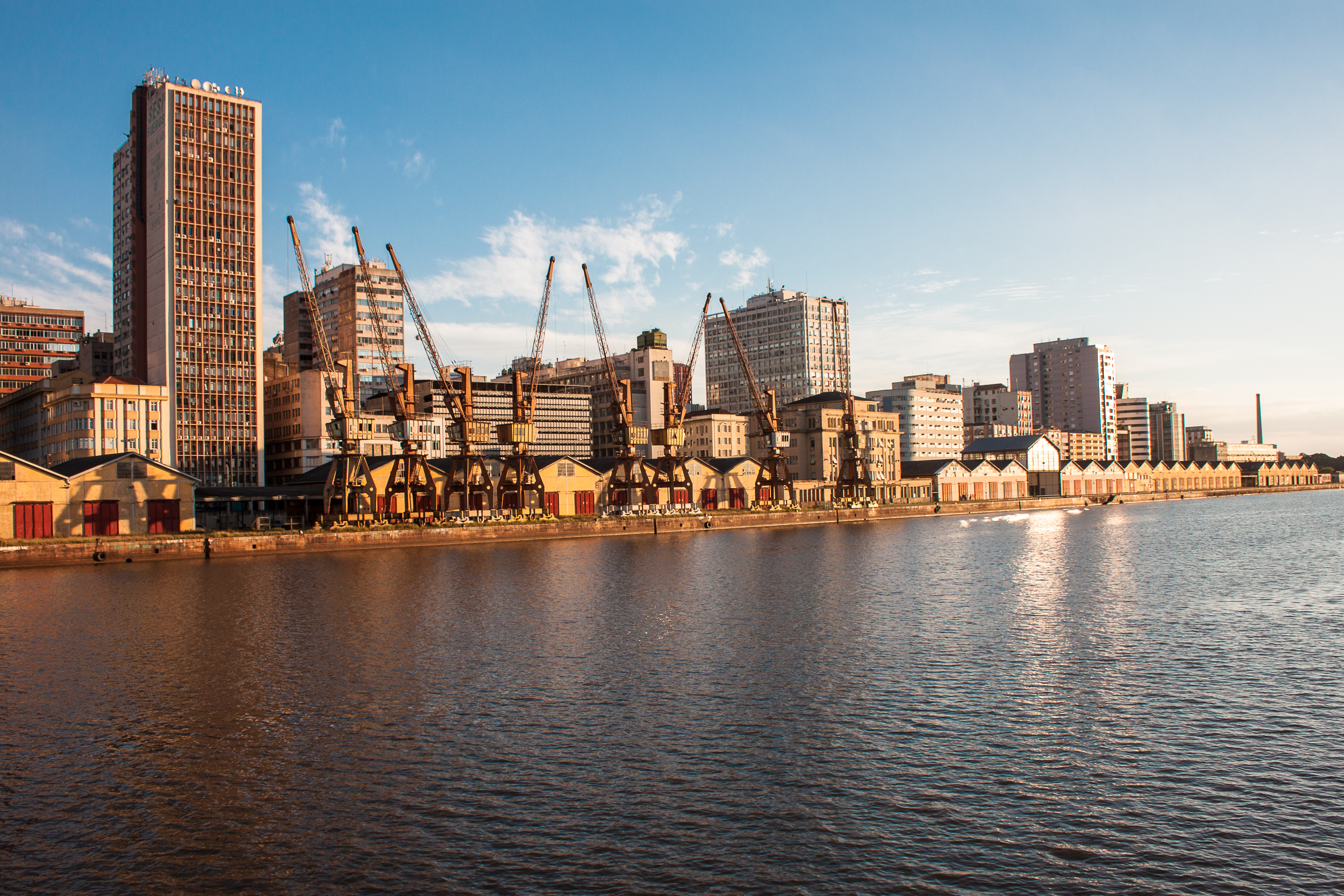 Cais do Porto: pórtico central e armazéns